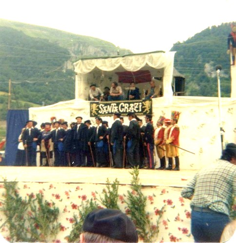 Santa Grazi pastorala. 1976. Santa Grazi.